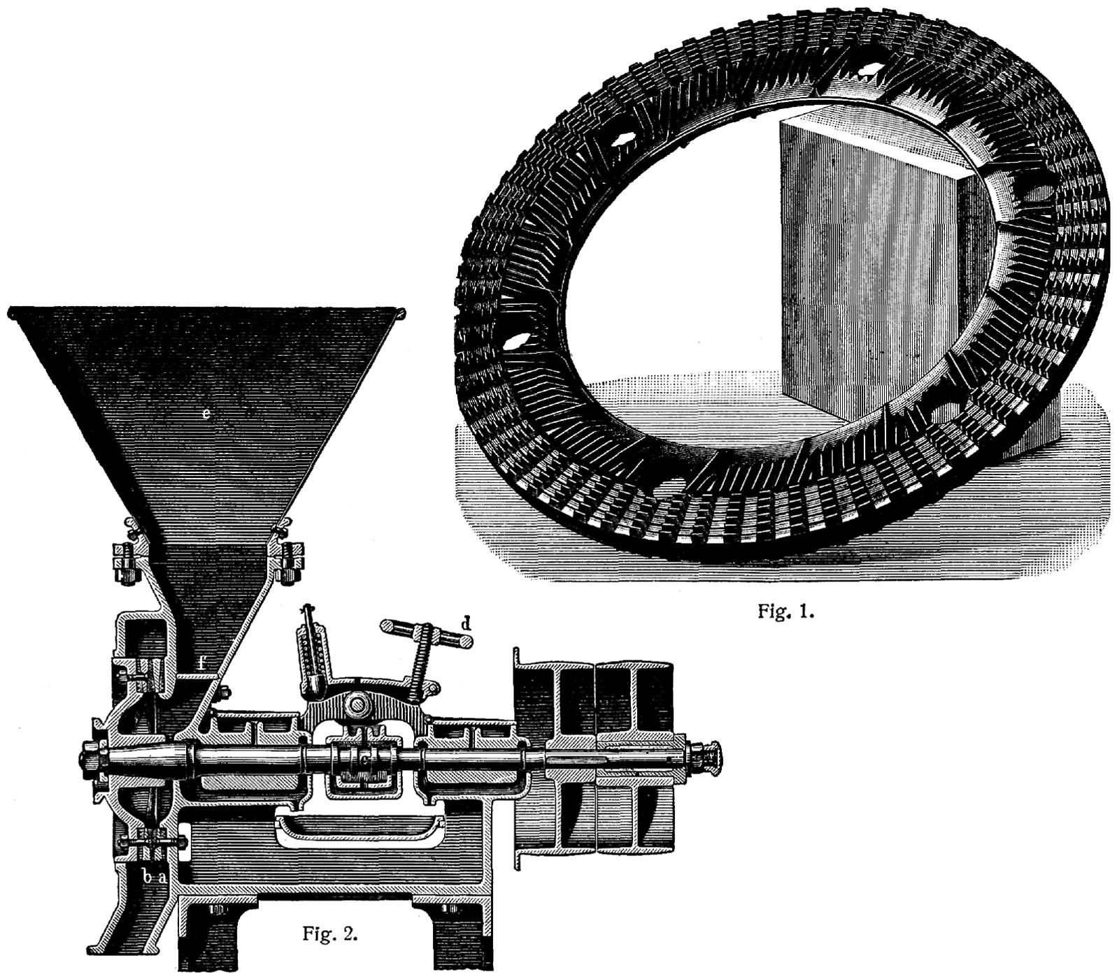 Exzelsiormühle des Grusonwerks, Magdeburg-Bruckau